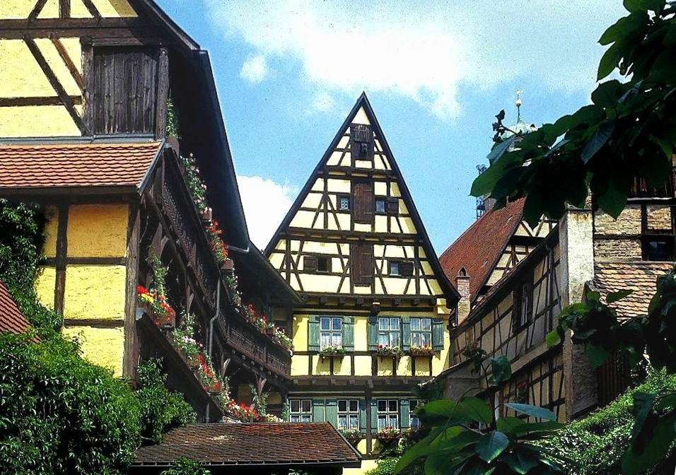 Hezelhof in Dinkelsbühl (16. Jahrhundert), Segringer Straße 7, Südseite